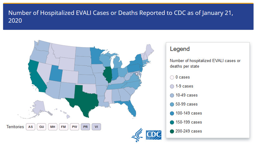 Mapa wypadków lub zgonów zgłoszonych do CDC styczeń 2020